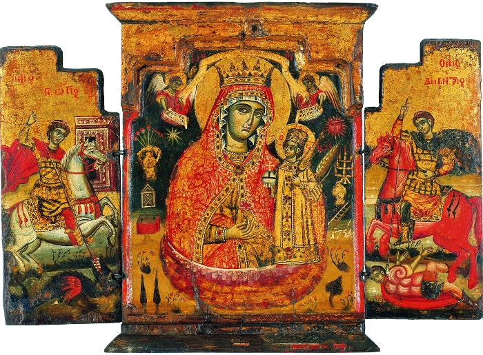 Триптих: Богоматерь Неувядающий Цвет, чудо Святого Георгия и чудо Святого Димитрия. 1754.